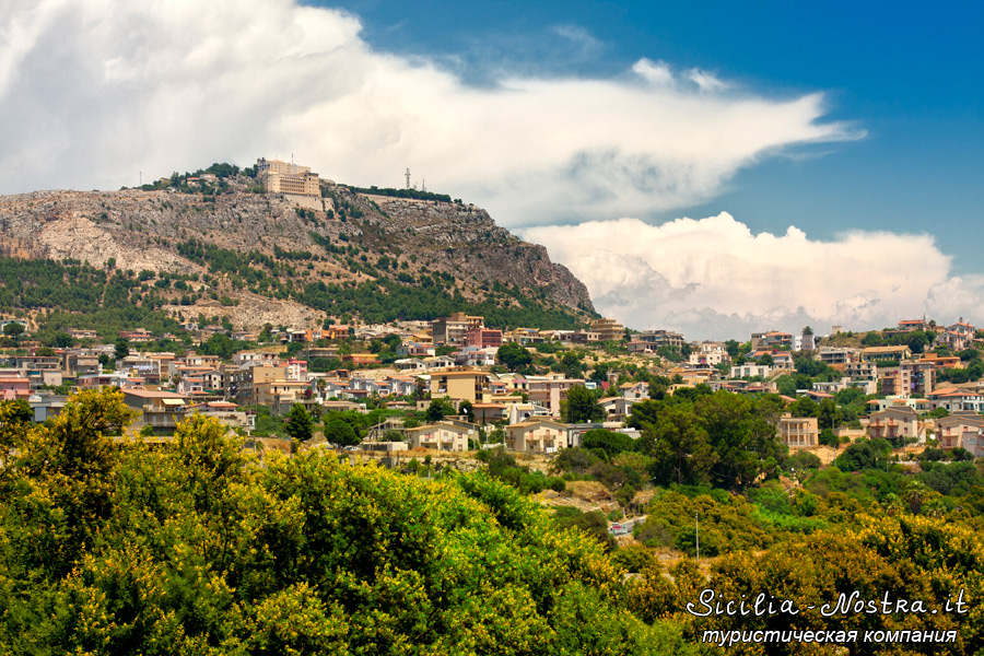 Sciacca